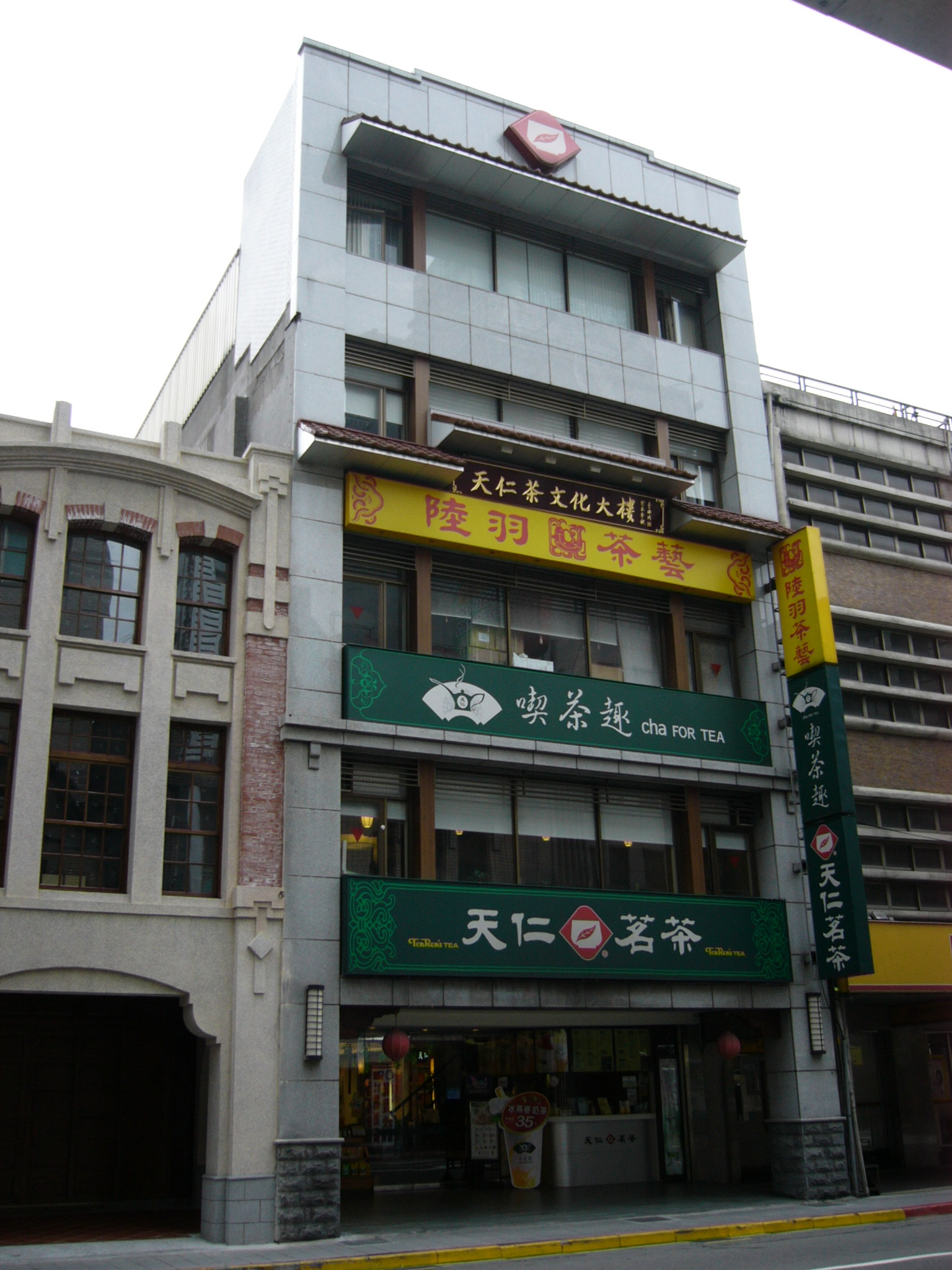 天仁茶文化大樓，天仁茶業興建，2003年12月10日啟用，位於臺北市中正區衡陽路62號。